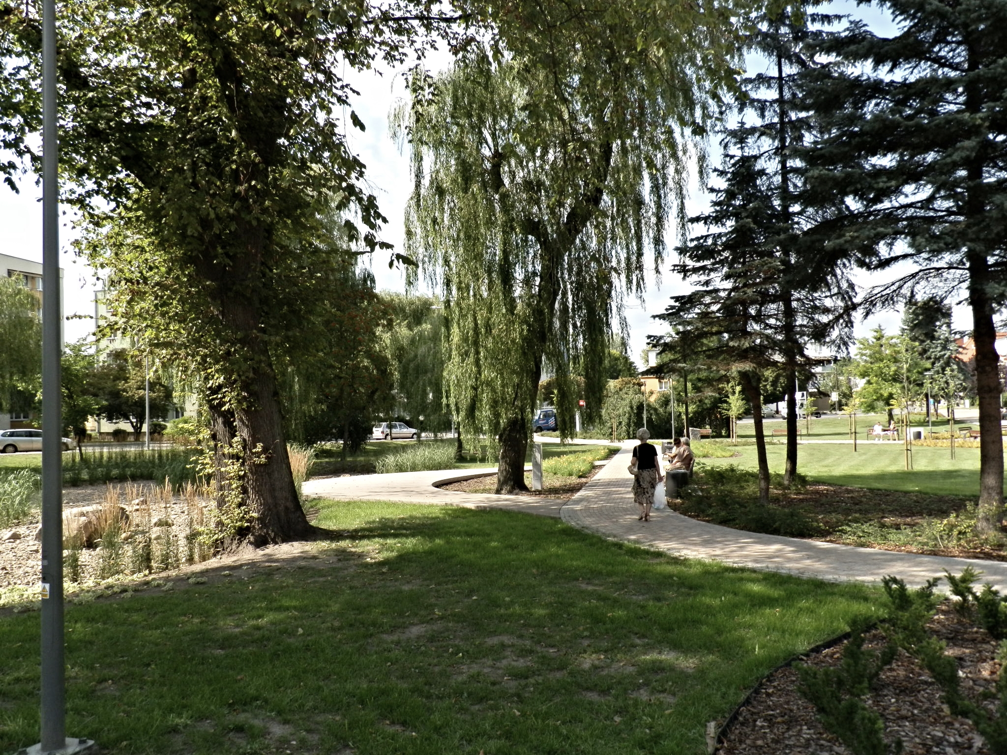 Park im. ks dra Janusza Ostrowskiego w Chodzieży przeszedł rewitalizację, którą rozpoczęto w październiku 2014 roku. W maju 2015 roku oddano do użytku fontannę.